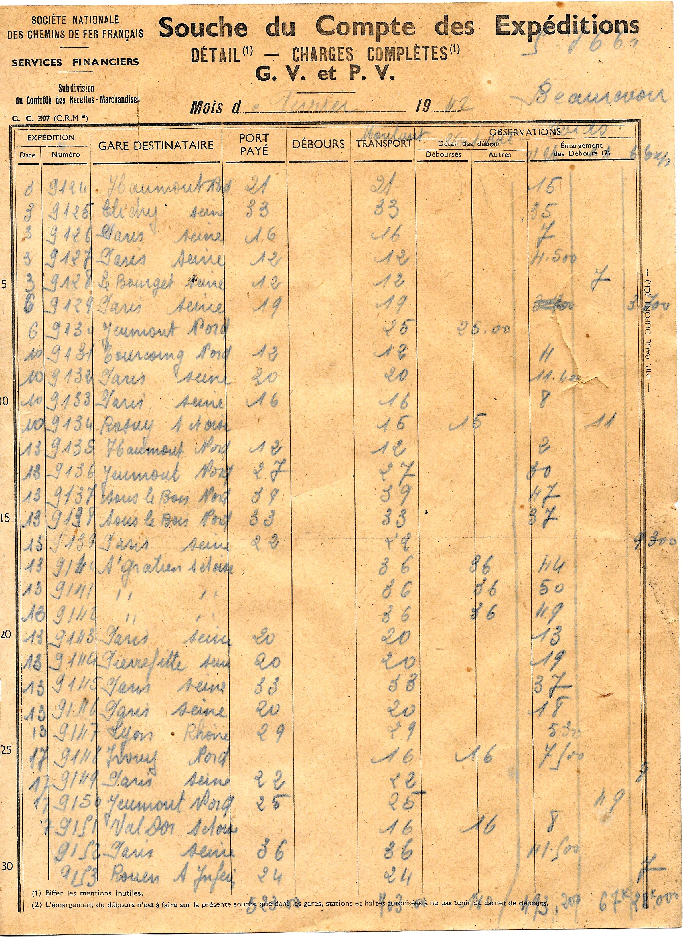 Etat des recettes de la gare de Beaurevoir en 1942.